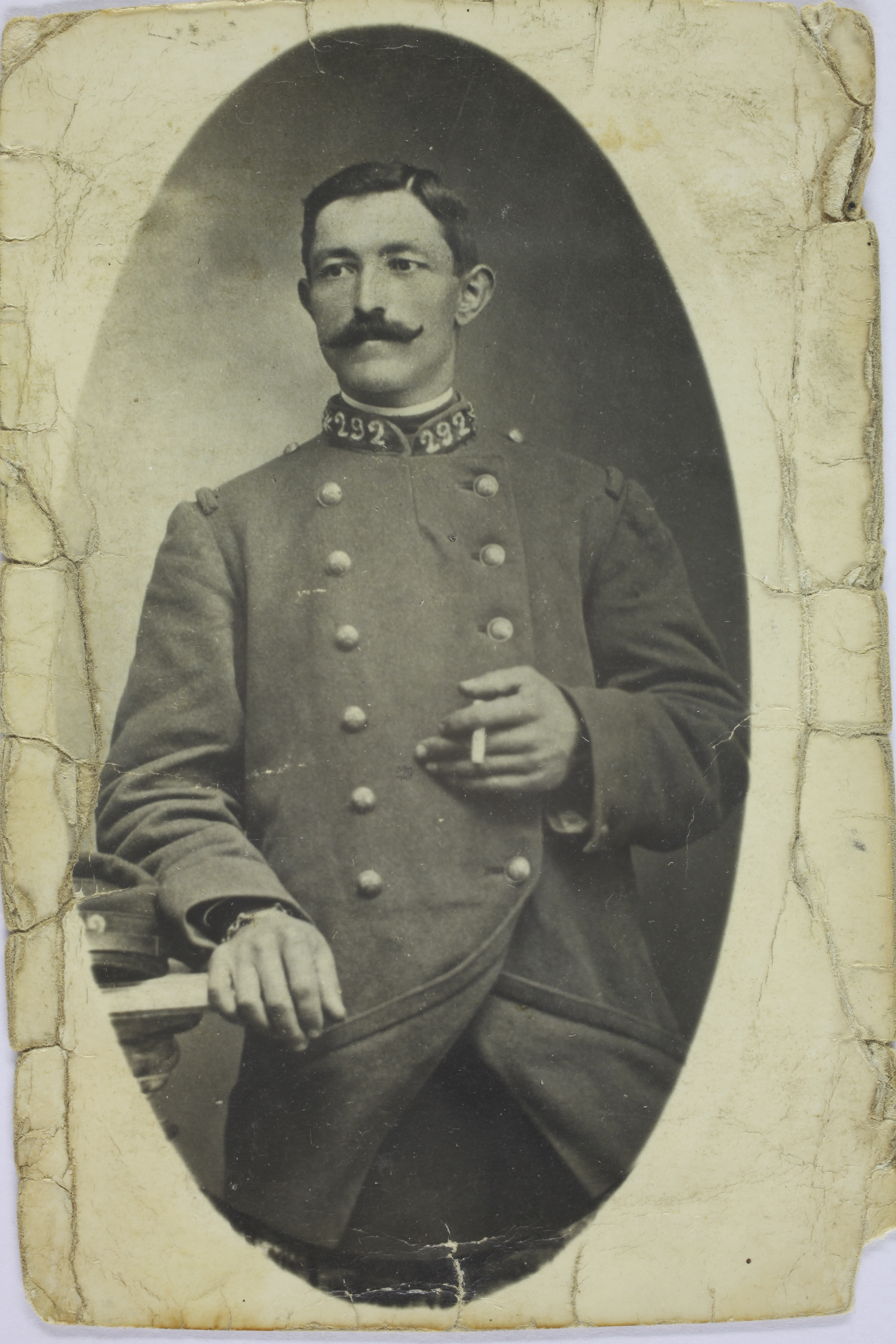 Boulanger, fils de Pierre BEUF et Marguerite BEAUNE. Recruté à Clermont-Ferrand (département du Puy-de-Dôme, France), classe 1904, matricule 485. A la mobilisation, arrivé au 92e régiment d'infanterie le 04/08/1914. Blessé à Puisieux (département de la Marne, France) le 08/09/1914 par balle à l'épaule gauche. Passé au 16e régiment d'infanterie le 16/03/1916, puis au 33e régiment territorial d'infanterie le 30/07/1917. Arrivé au 20e escadron de train le 09/02/1918. Pension d'invalidité permanente à 20% en raison de sa blessure par balle à partir de 1924. Reformé définitivement pour invalidité à 100% "infirmité" en avril 1927. Décédé quelques mois plus tard, le 27/09/1927, à Lempdes (département du Puy-de-Dôme, France).